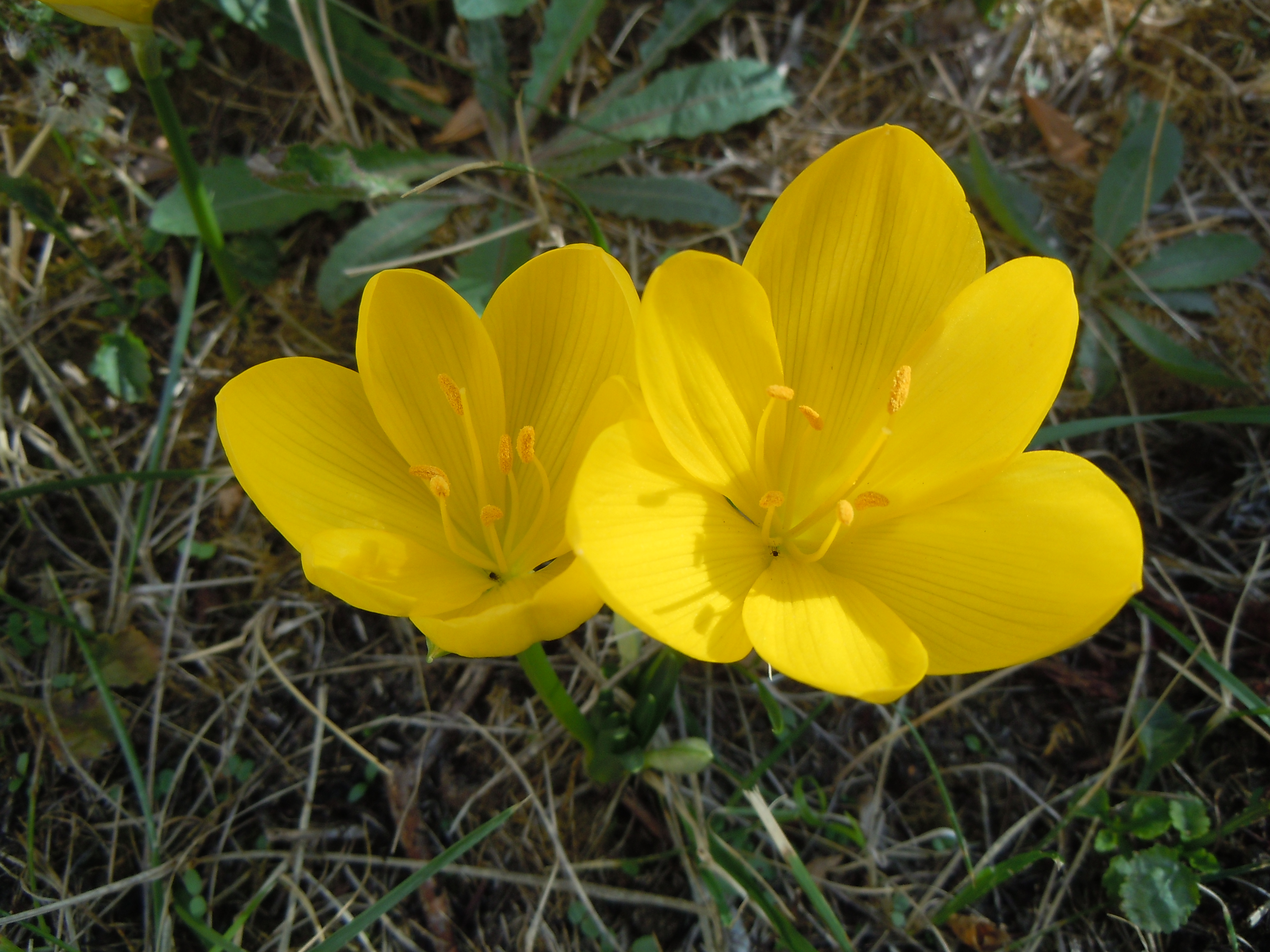 Sternbergia lutea - cultivée - Île de France, floraison en septembre.